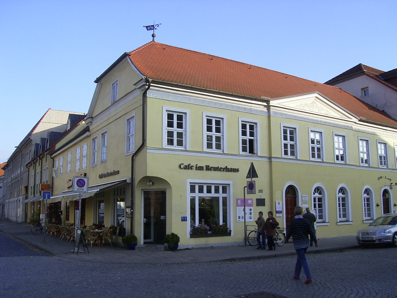 Fritz-Reuter-Haus in Neubrandenburg. In diesem Haus lebte Fritz Reuter von 1859 bis 1861.